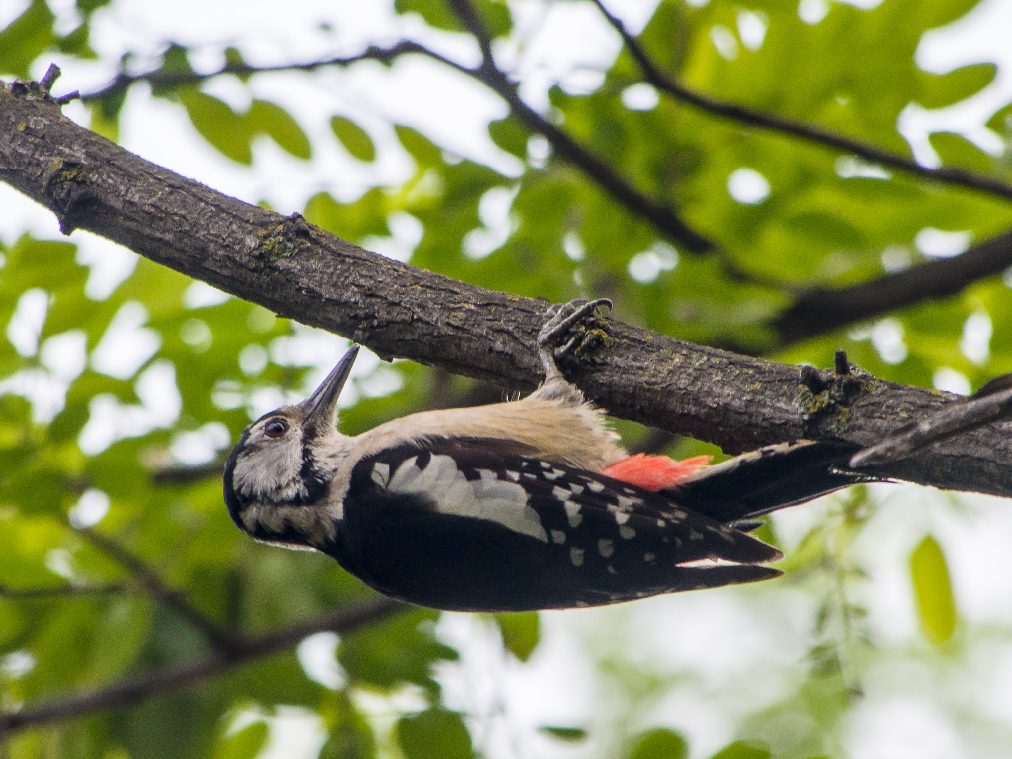 Himalayan Woodpecker Dendrocopos himalayensis, Shankaracharya Hill, Srinagar, Kashmir